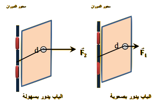 شدة القوة